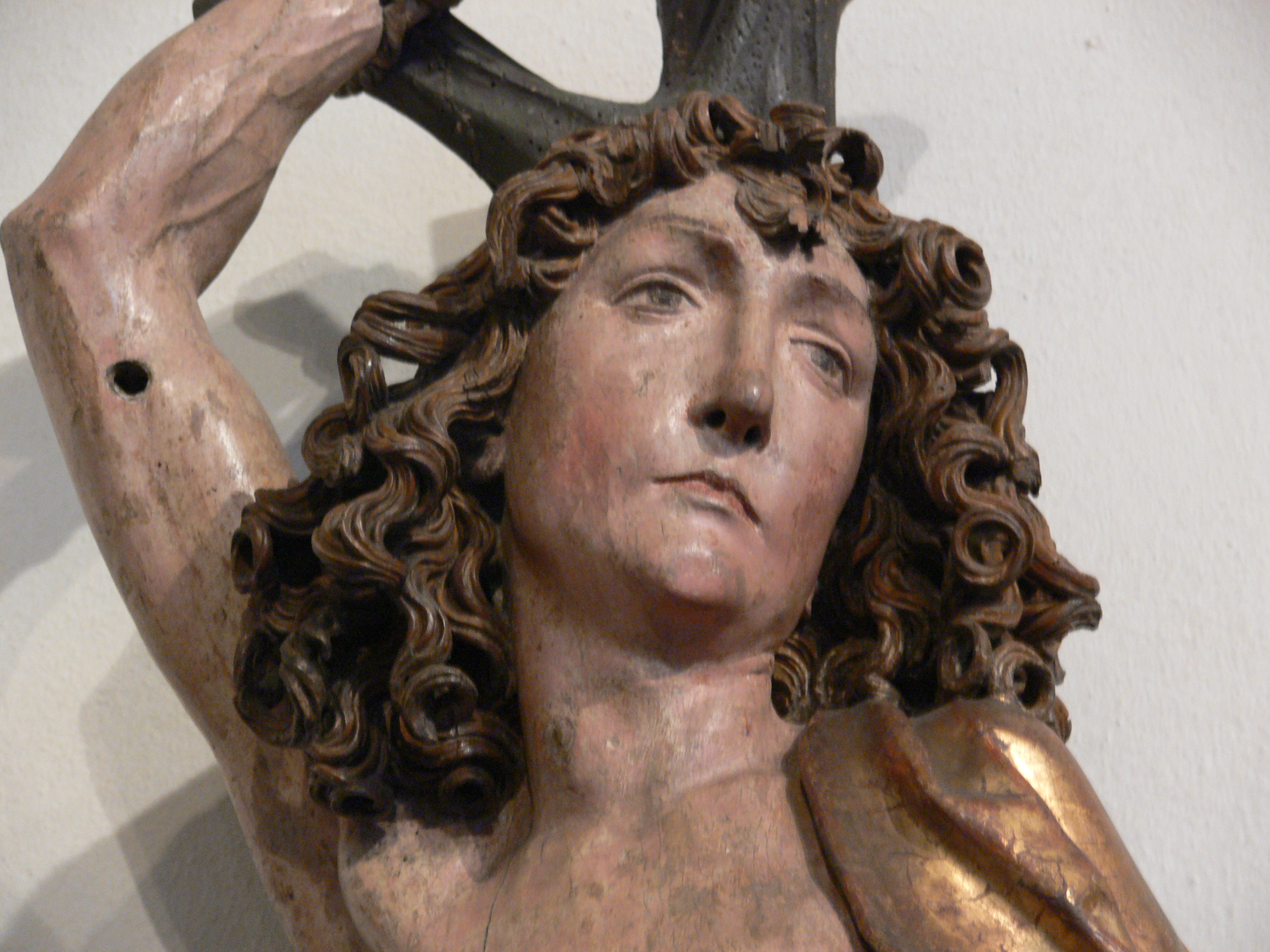 Hl. Sebastian, Würzburg, gegen 1490; Detail Bayerisches Nationalmuseum, München, Inv. Nr. 12/260